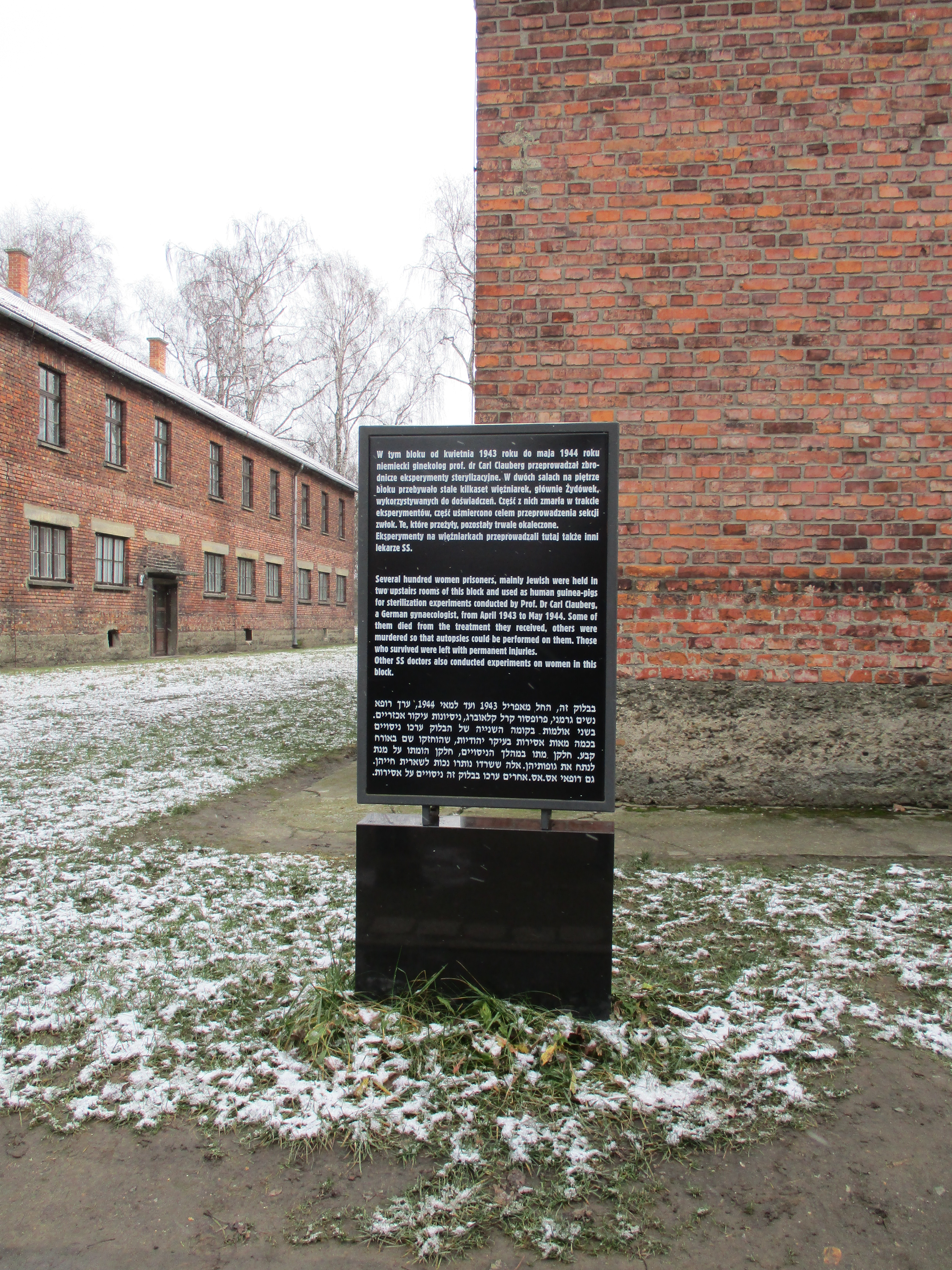 אושוויץ (5).jpg